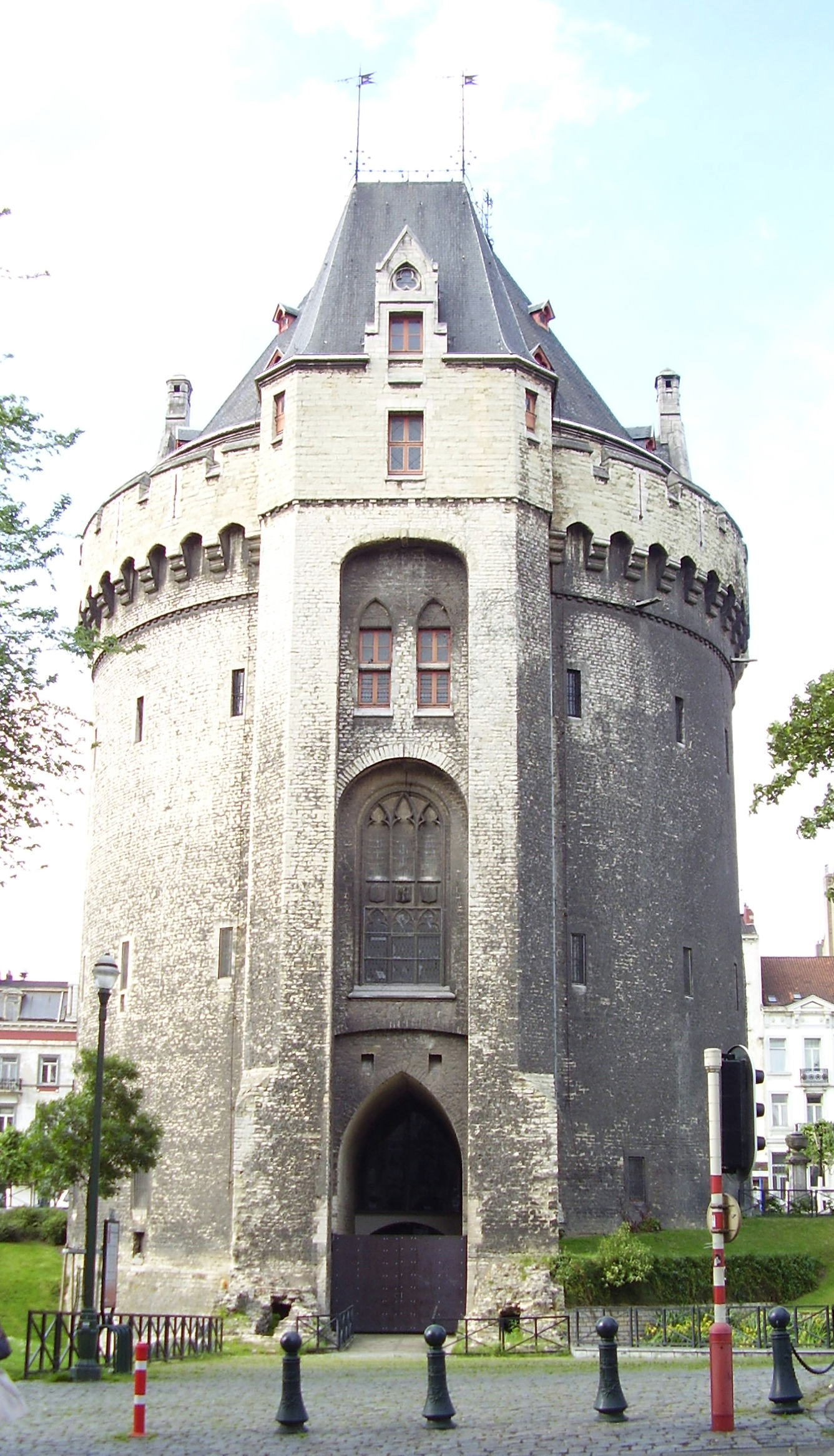 Porte de Hal – Côté Saint-Gilles